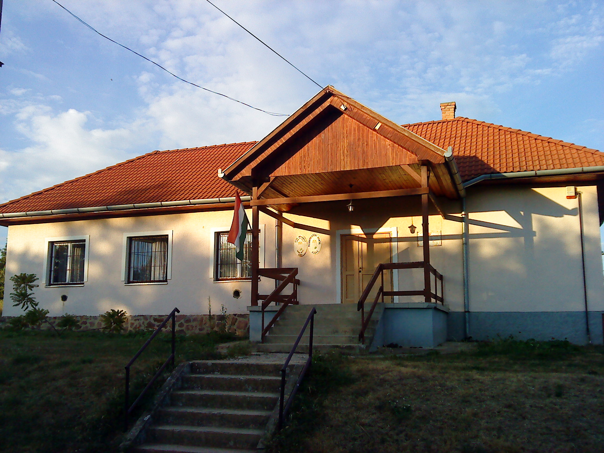 Szőke polgármesteri hivatala